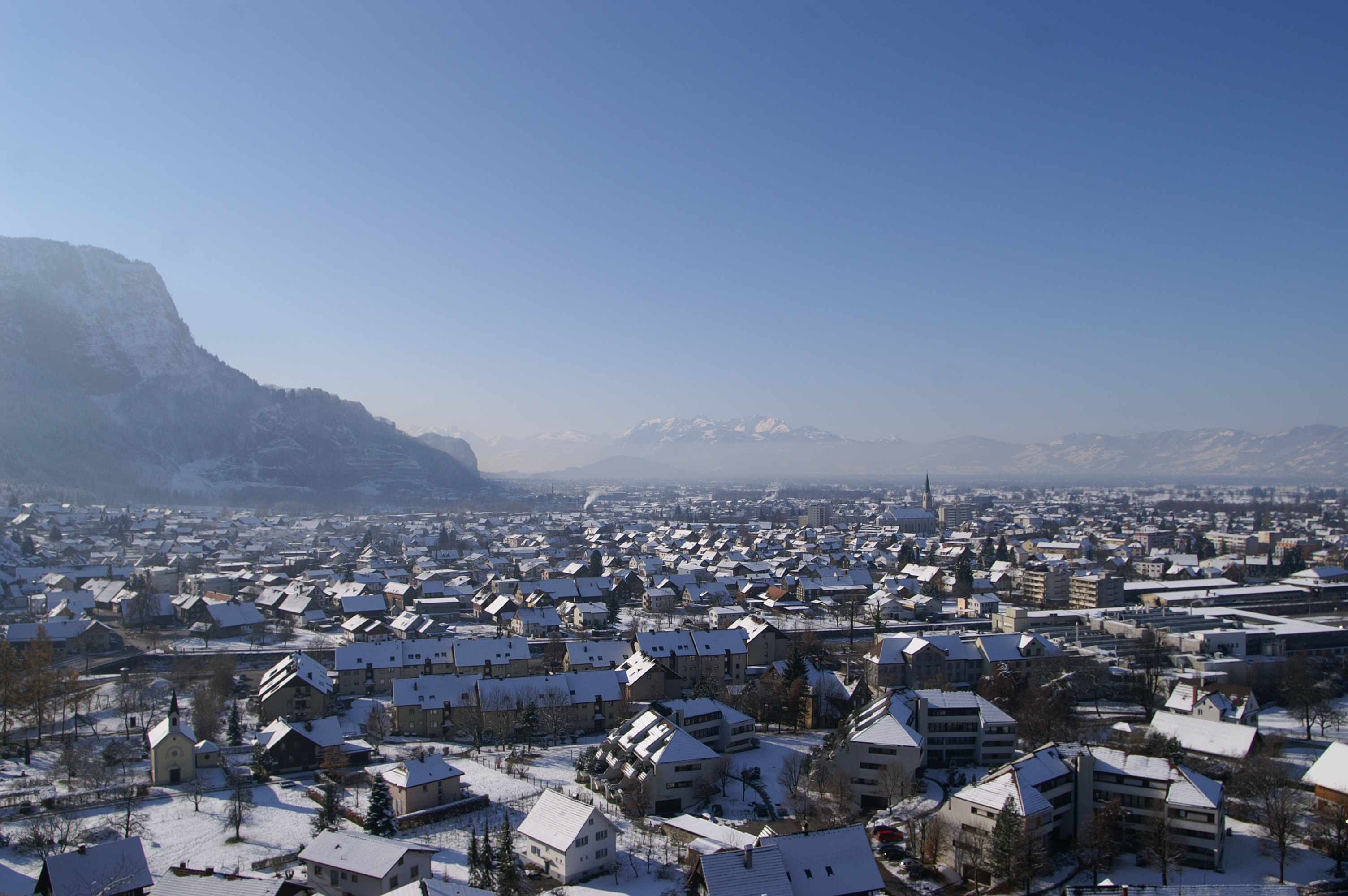 Blick vom Zanzenberg auf Juchen im Stadtteil Markt und zum Bezirk Hatlerdorf von Dornbirn. Im Hintergrund das Schweizer Alpsteingebirge.